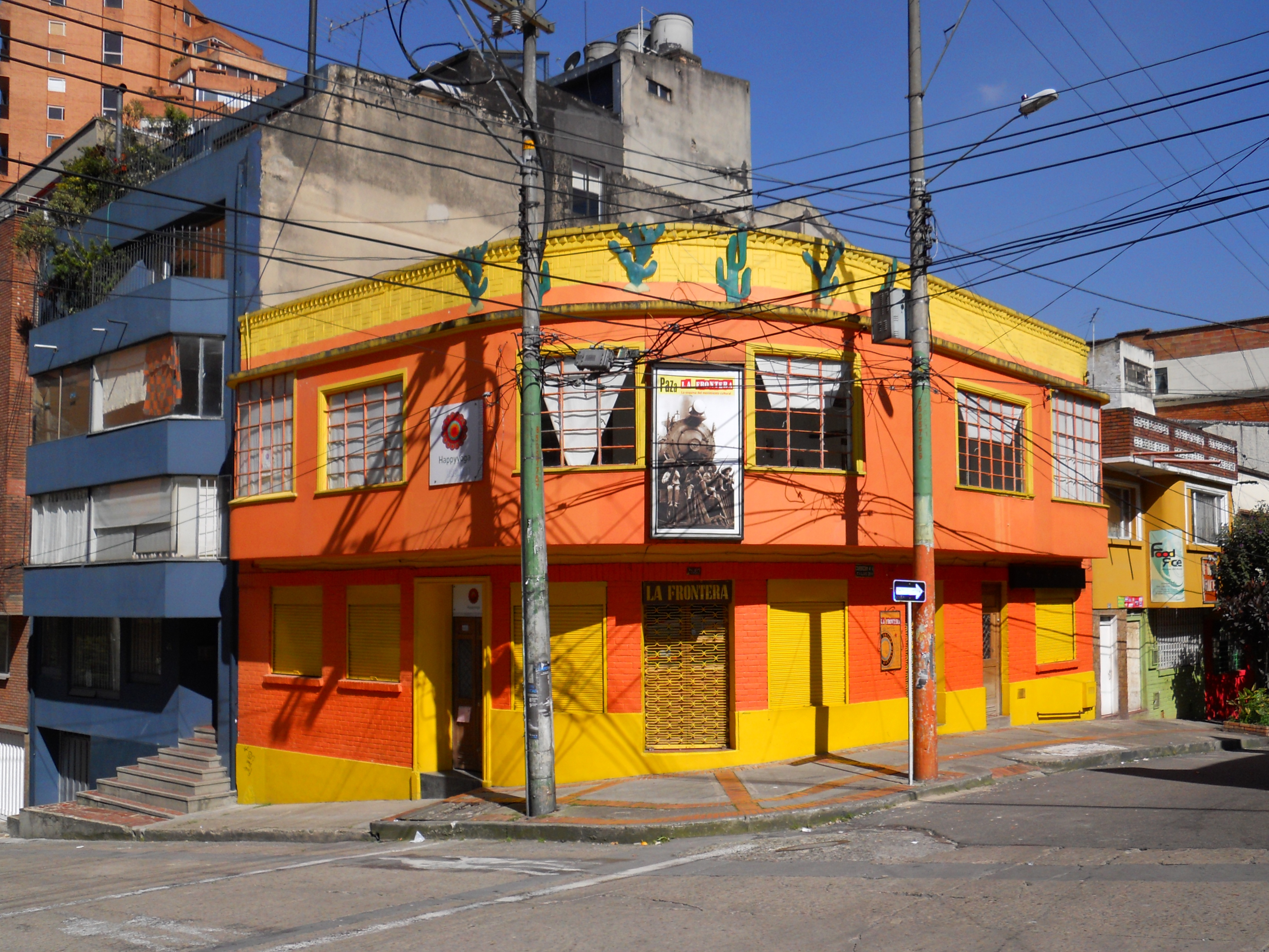 Bogotá. Restaurante de comida mexicana La Frontera en el barrio La Macarena, carrera 26A con calle 4A.